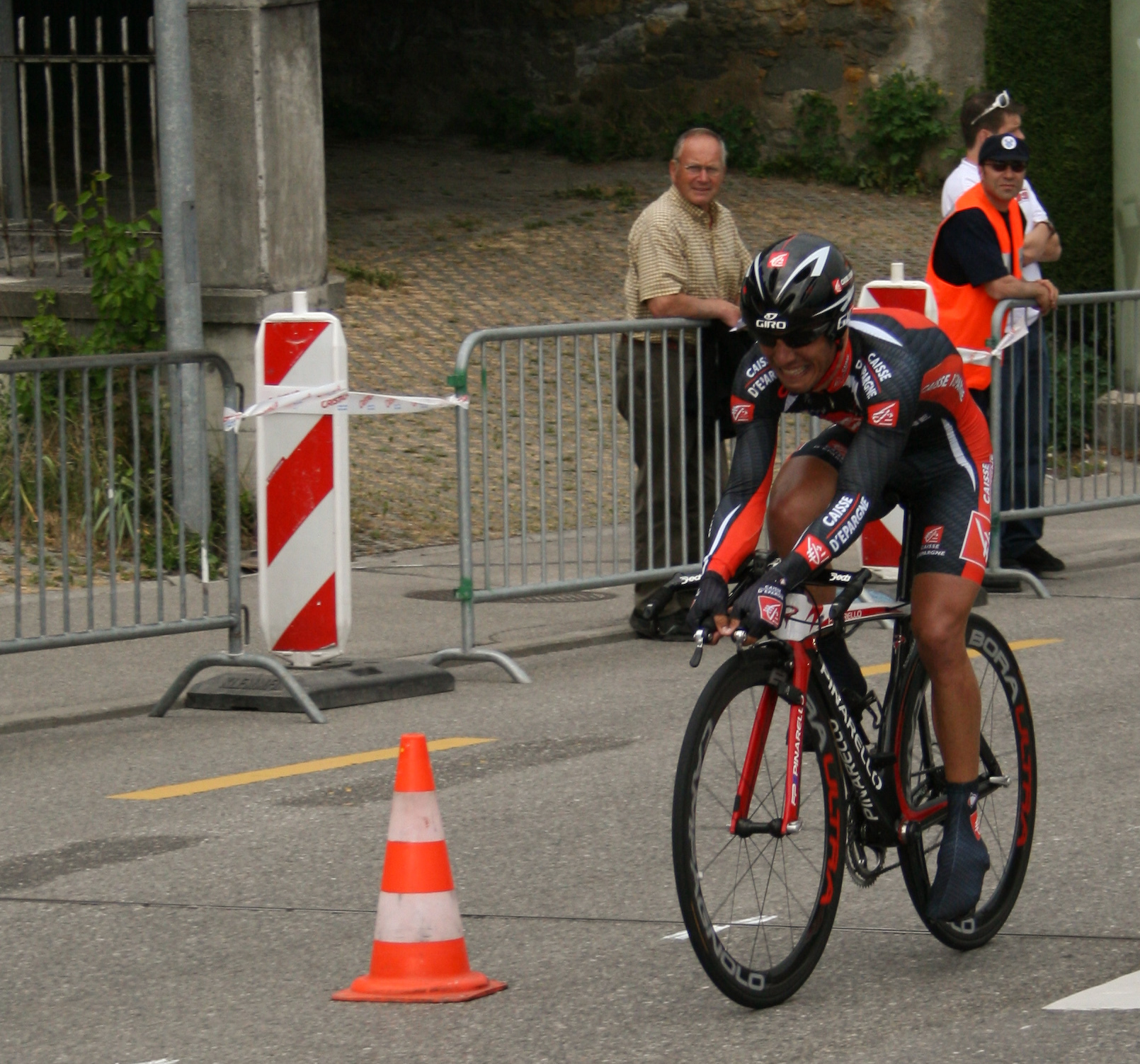 Joaquim Rodriguez Oliver prologue du Tour de Romandie 2007